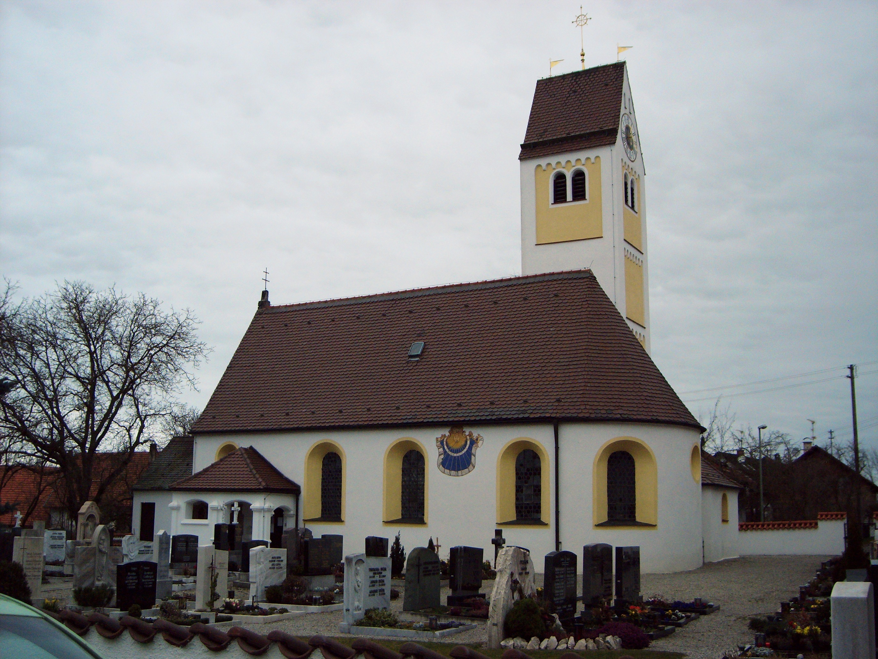 Katholische Filialkirche St. Michael in Ummendorf, Gemeinde Pürgen, Kreis Landsberg am Lech